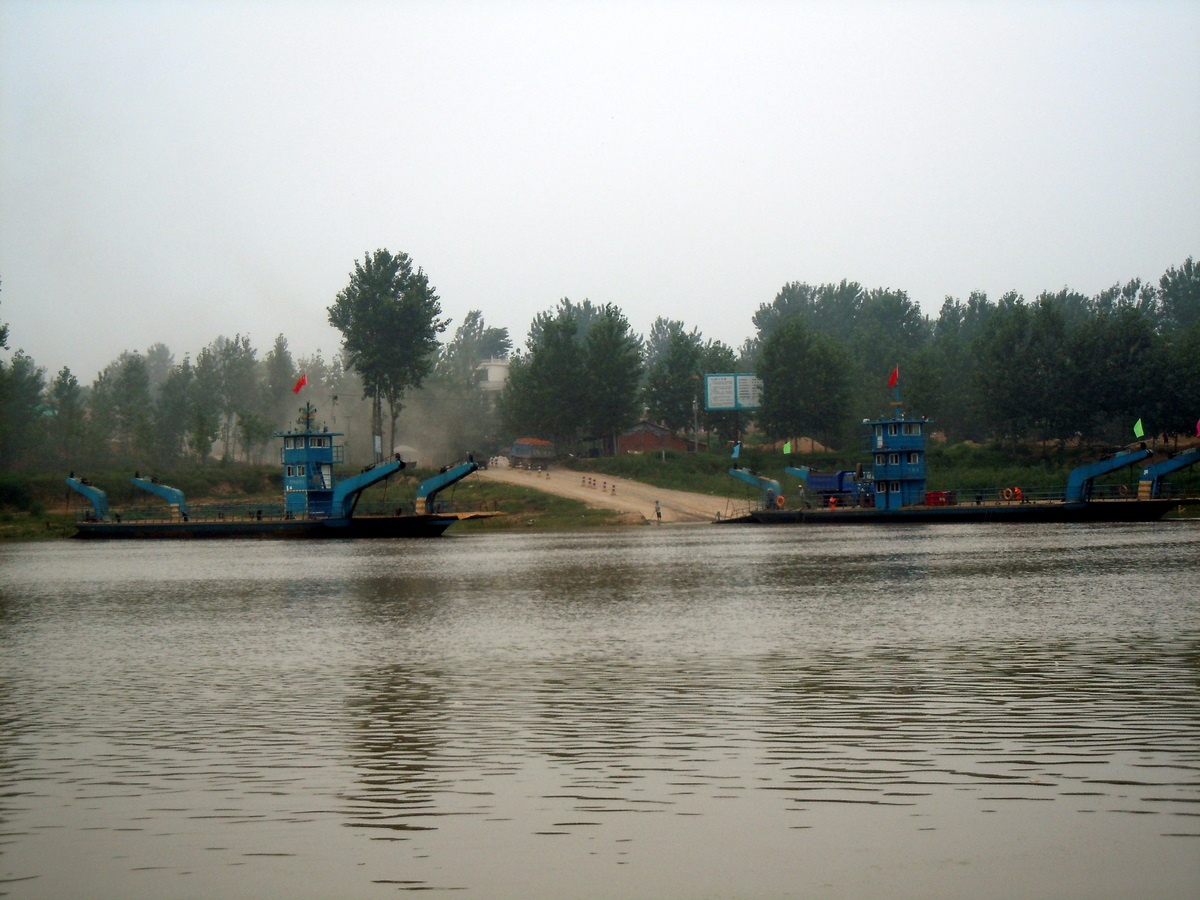 淮河邢郢渡口